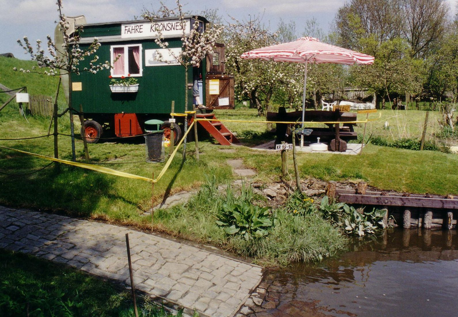 Aufenthaltswagen der Fährleute an der Fähre Kronsnest